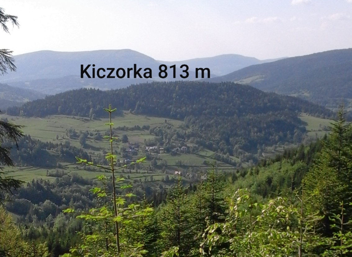 Kiczorka, widok z drogi stokowej na zboczu Jasienia